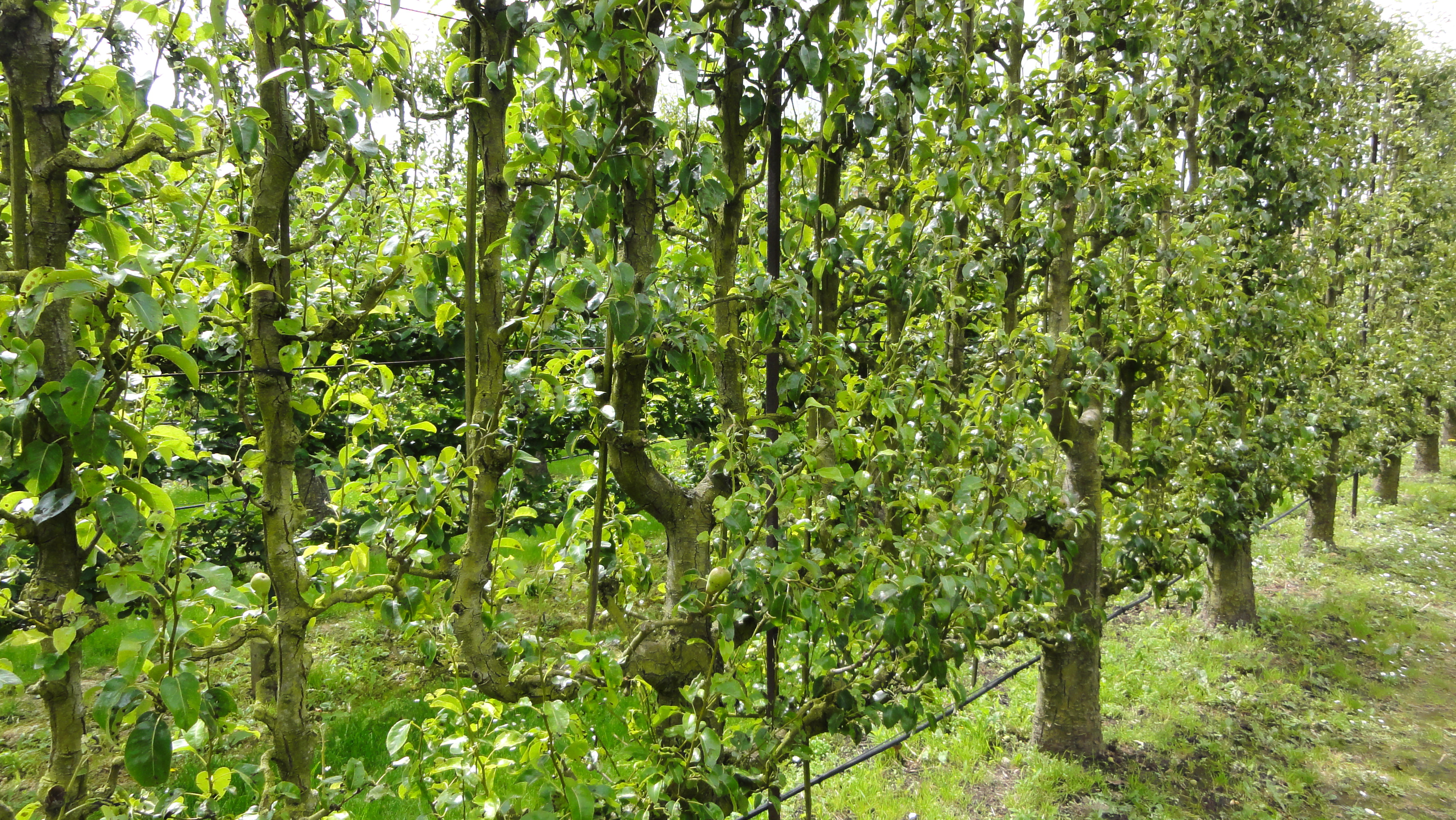 Potager du roi - Jardin Lelieur